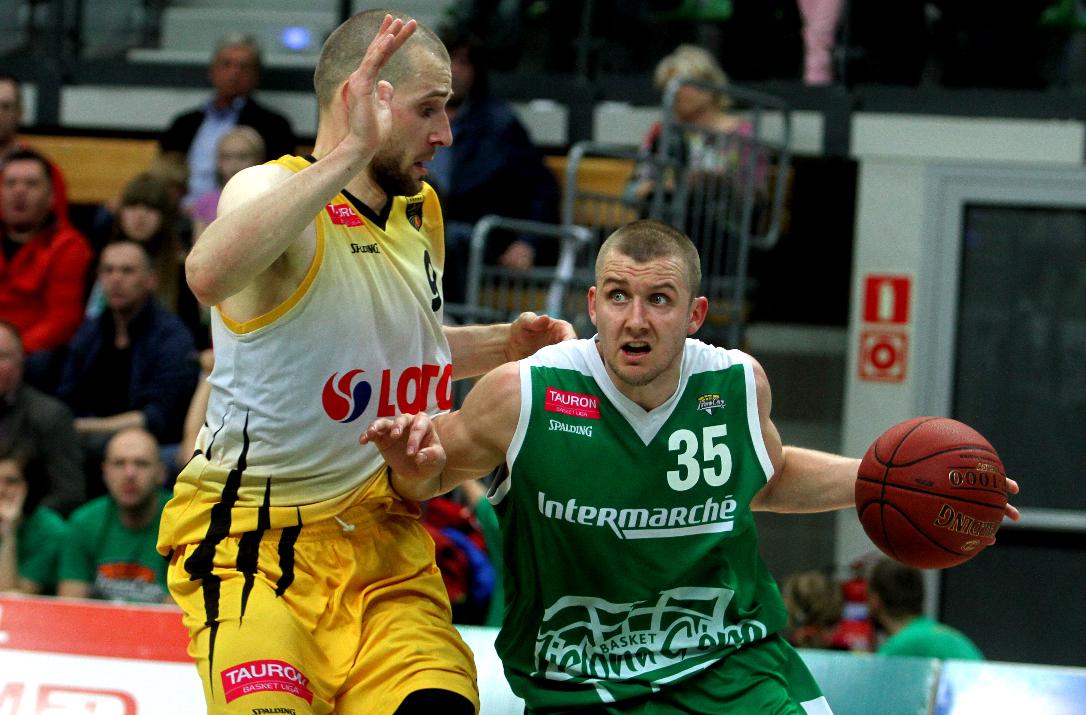 Przemysław Zamojski Stelmet Zielona Góra